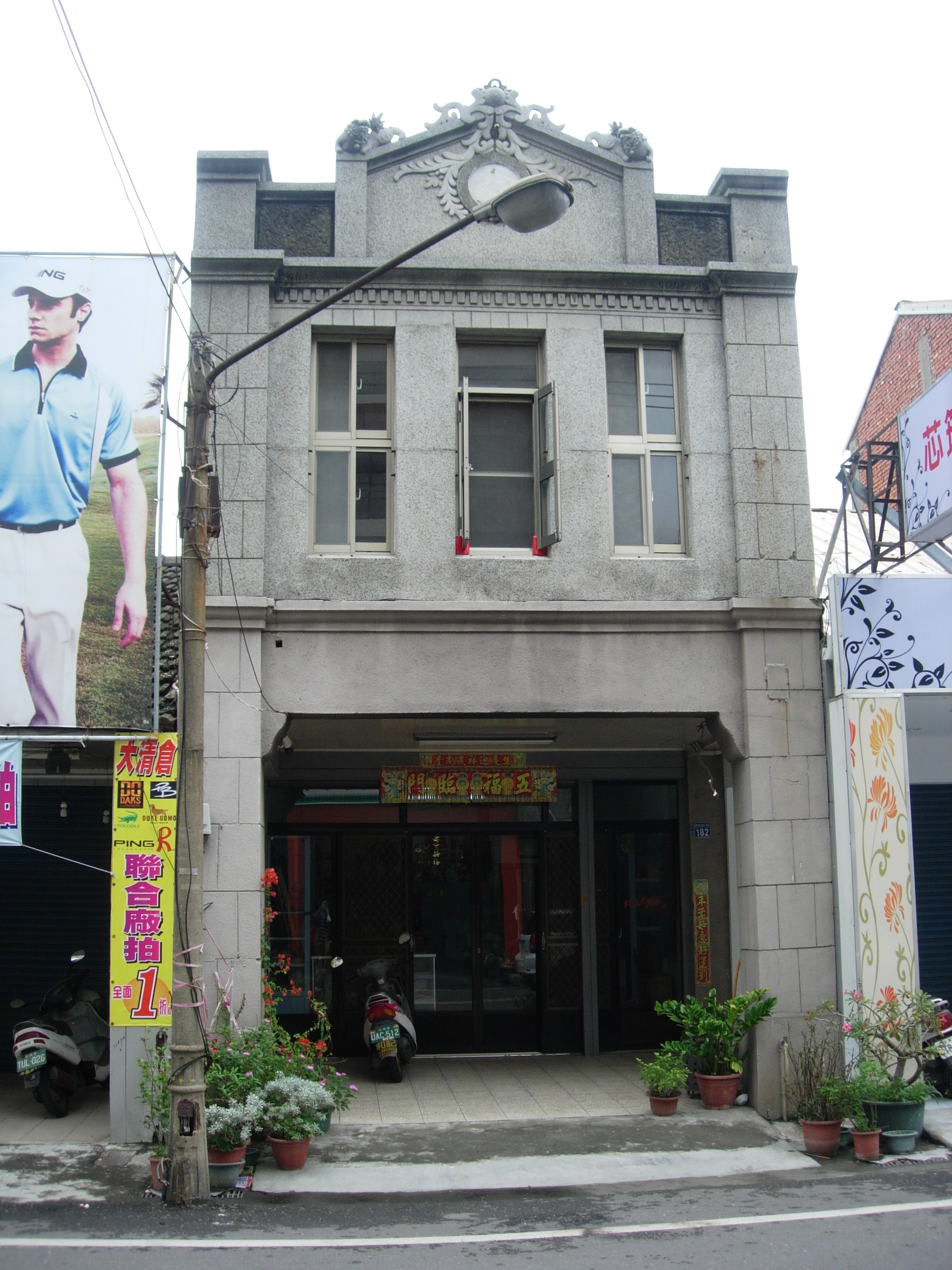 中文（台灣）: 溪湖老街。